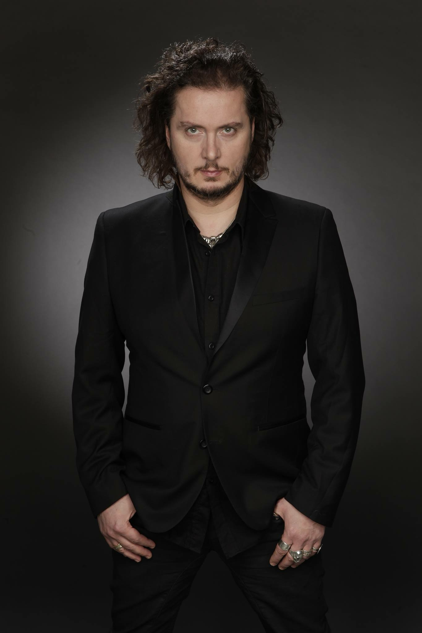 Kentaur (eredeti neve: Erkel László) (Budapest, 1965. április 18. –) magyar díszlet- és jelmeztervező, festő, zenész, énekes.